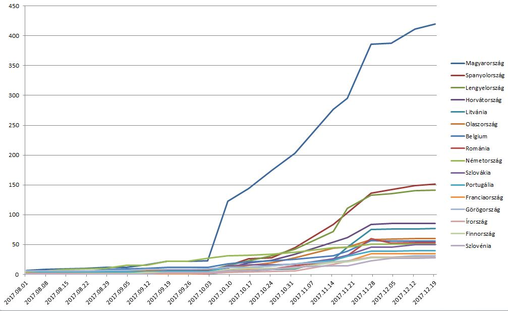 Befogadott programok számának alakulása 2017